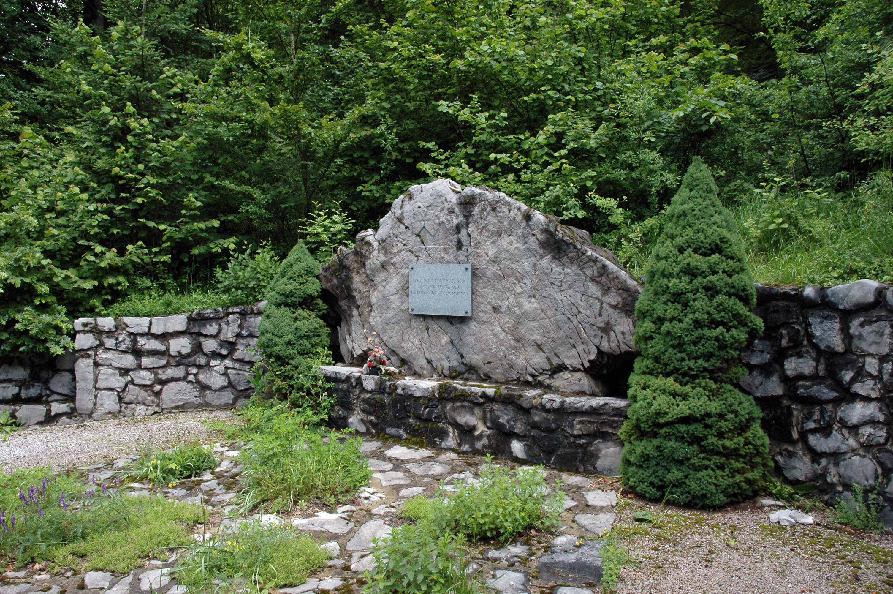 Foto: Alenka Veber, spominsko obeležje ob cesti Jermendol - Babno Polje